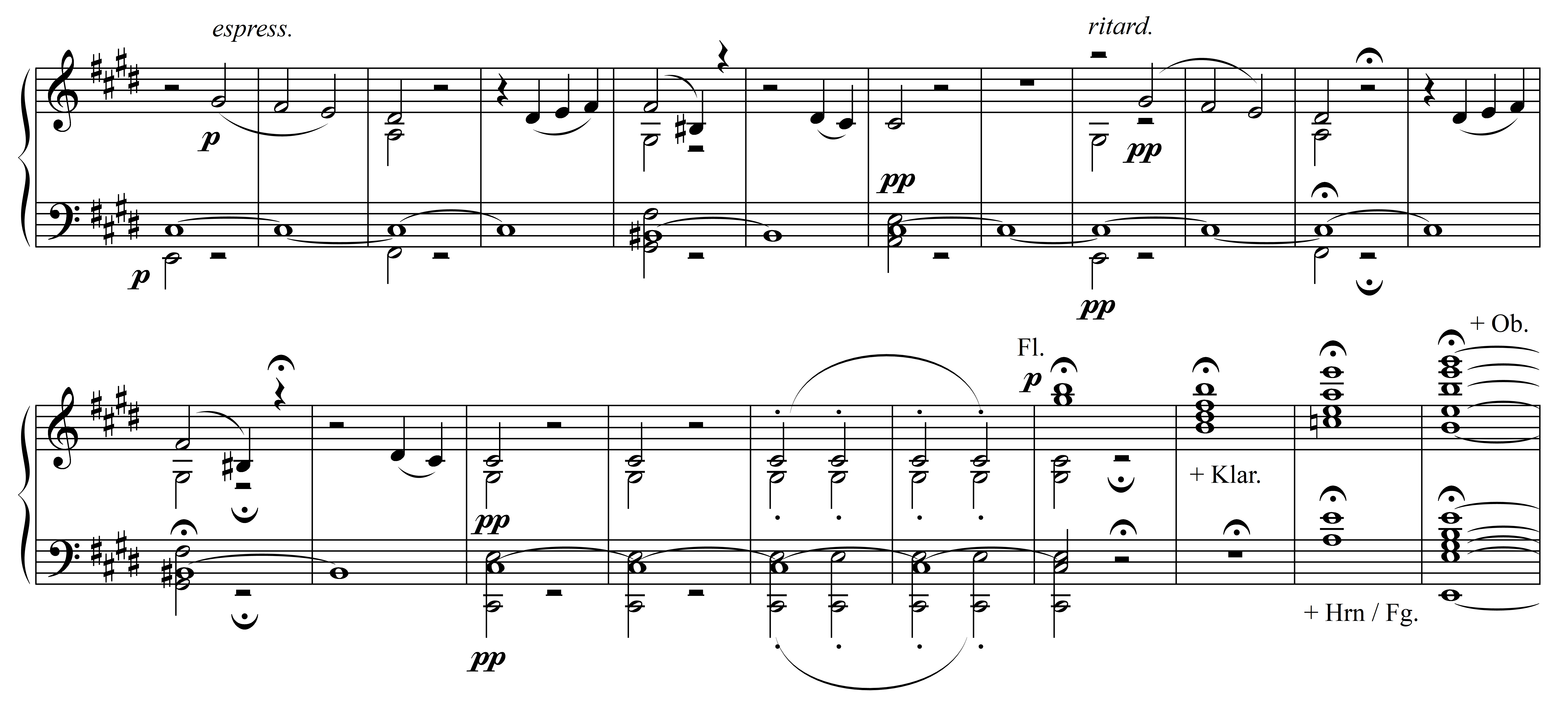 Notenbeispiel Mendelssohn - Sommernachtstraum Durchführung T. 376-394